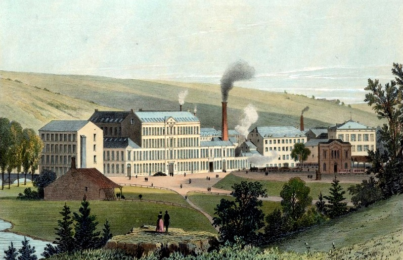 Hauptwerk der Tuchfabrik Peltzer in Verviers, Lithographie von Guillaume Vanderhecht